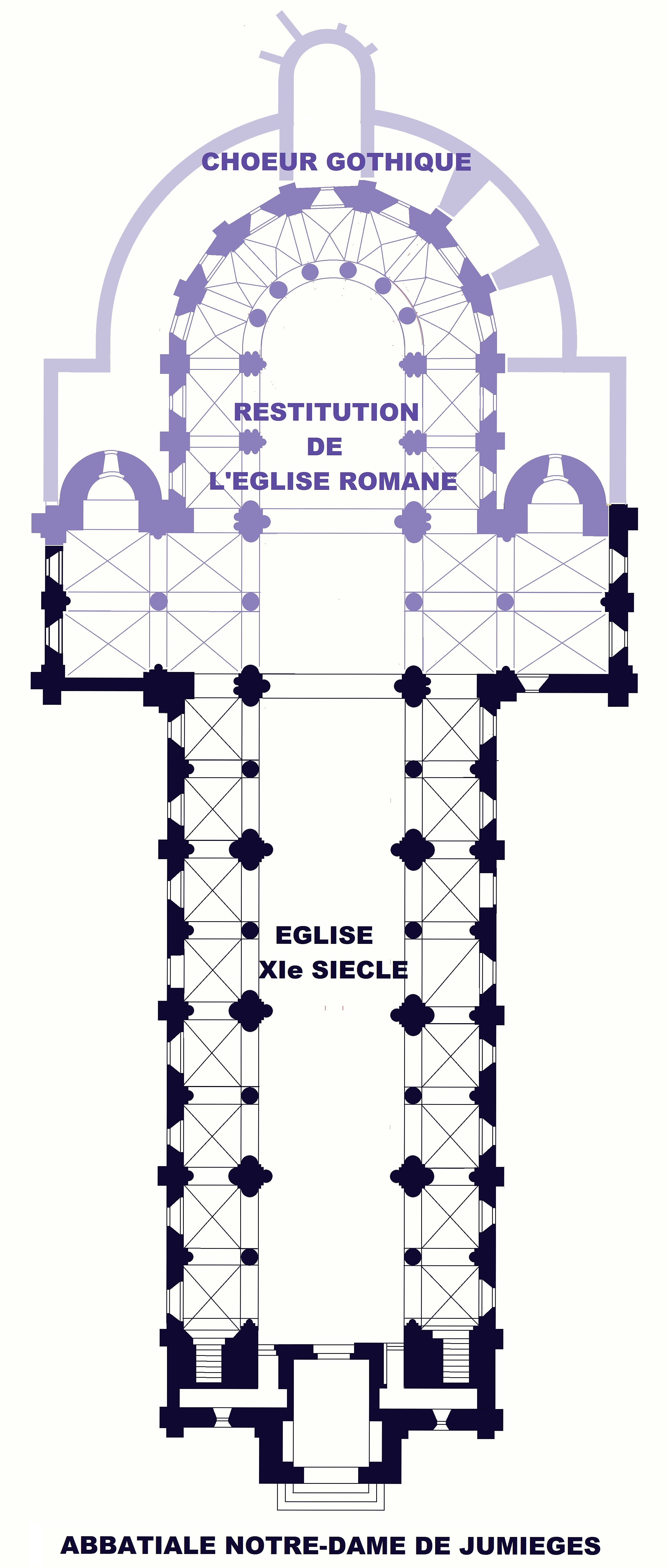 Abbaye de Jumièges, Plan de l'abbatiale Notre-Dame avec restitution de l'église romane (G. Lanfry)